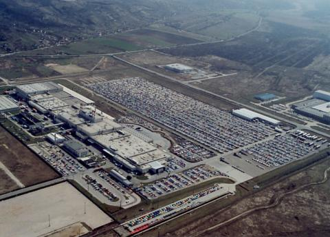 A Suzuki gyár Esztergomban